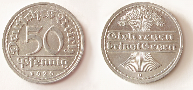 Deutsches Reich, 50 Pfennig, 1920, d=23 mm, 1.67 gramm, Al 990, Cu 10